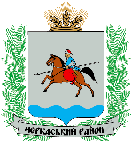 Герб Черкаського району